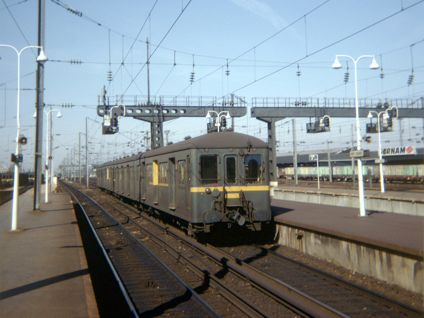 Une rame "Standard" à Pont-Cardinet le 18 septembre 1976.